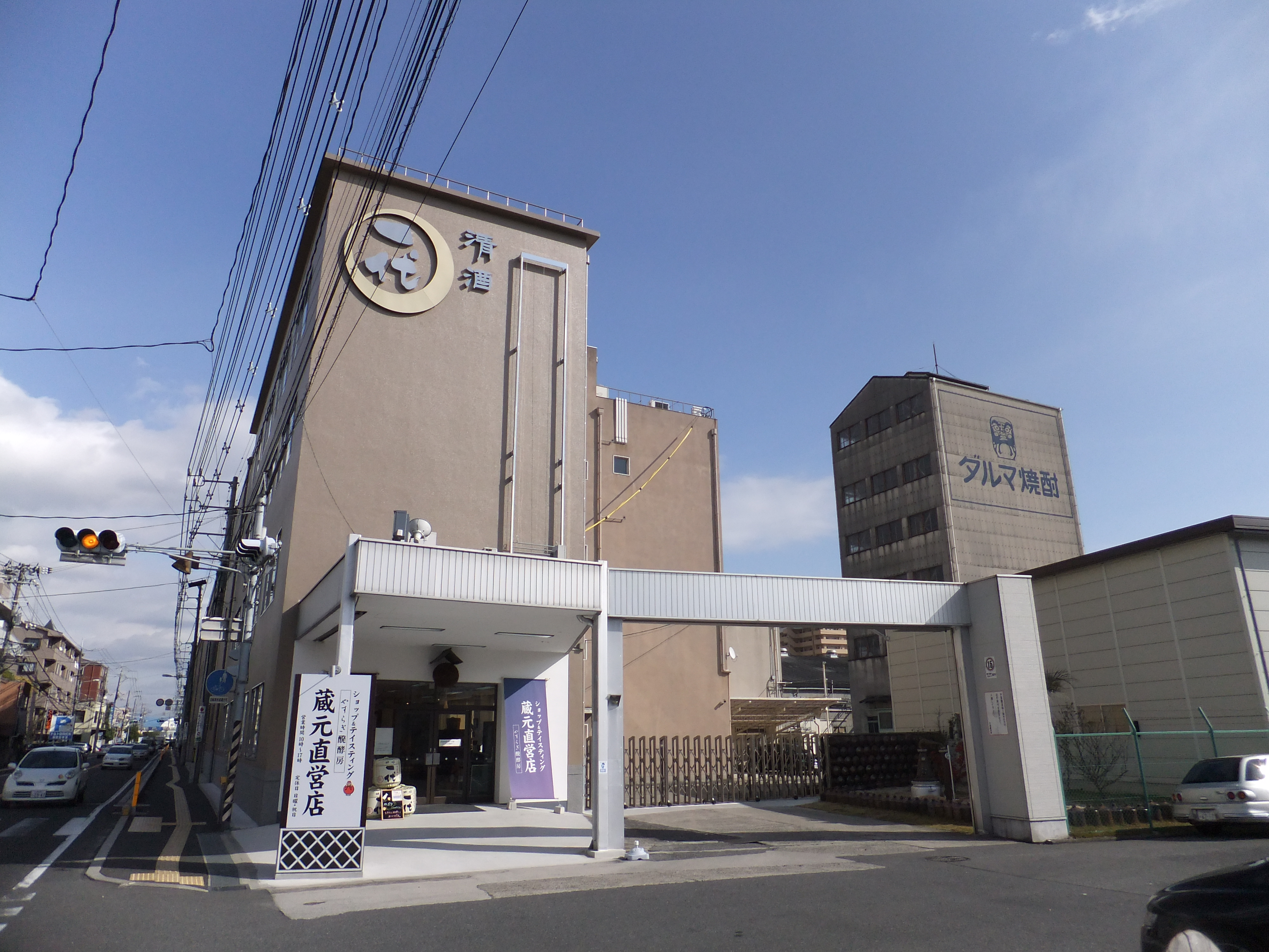 中国醸造